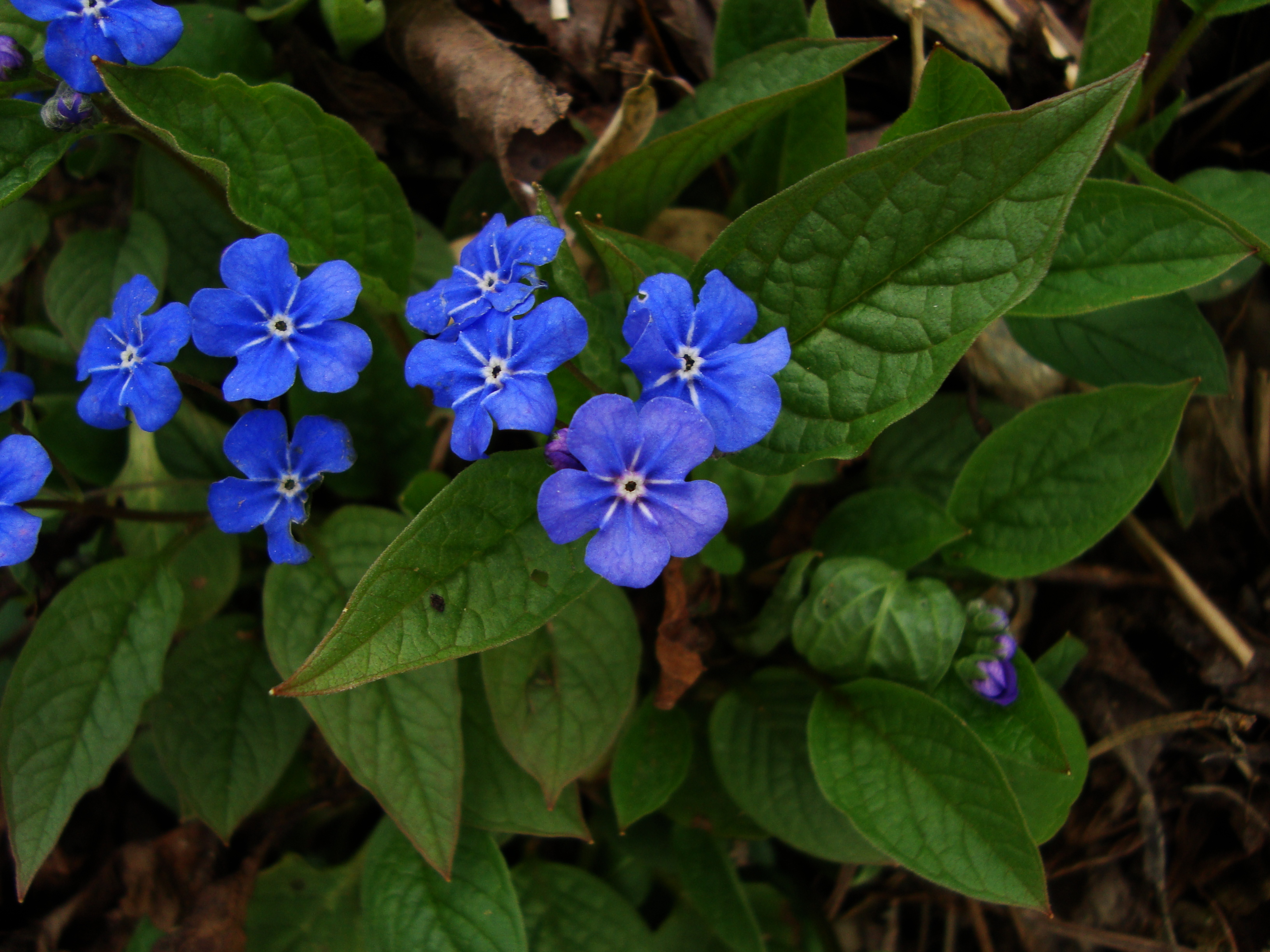 Omphalodes verna